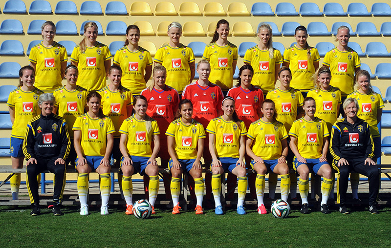 a_1_4421